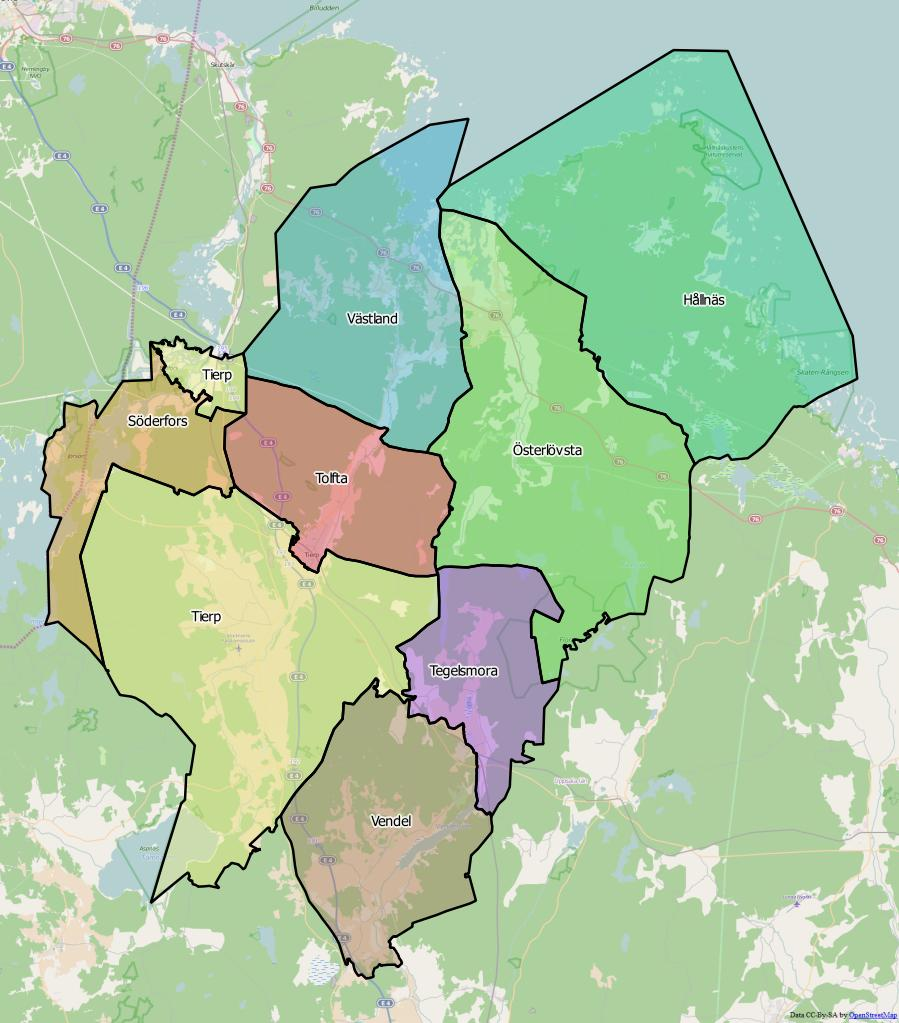 Distriktsindelningen i Tierps kommun World file: 134.85780056085317824 0 0 -134.85780056085317824 1907980.80852317158132792 8551222.7512628473341465